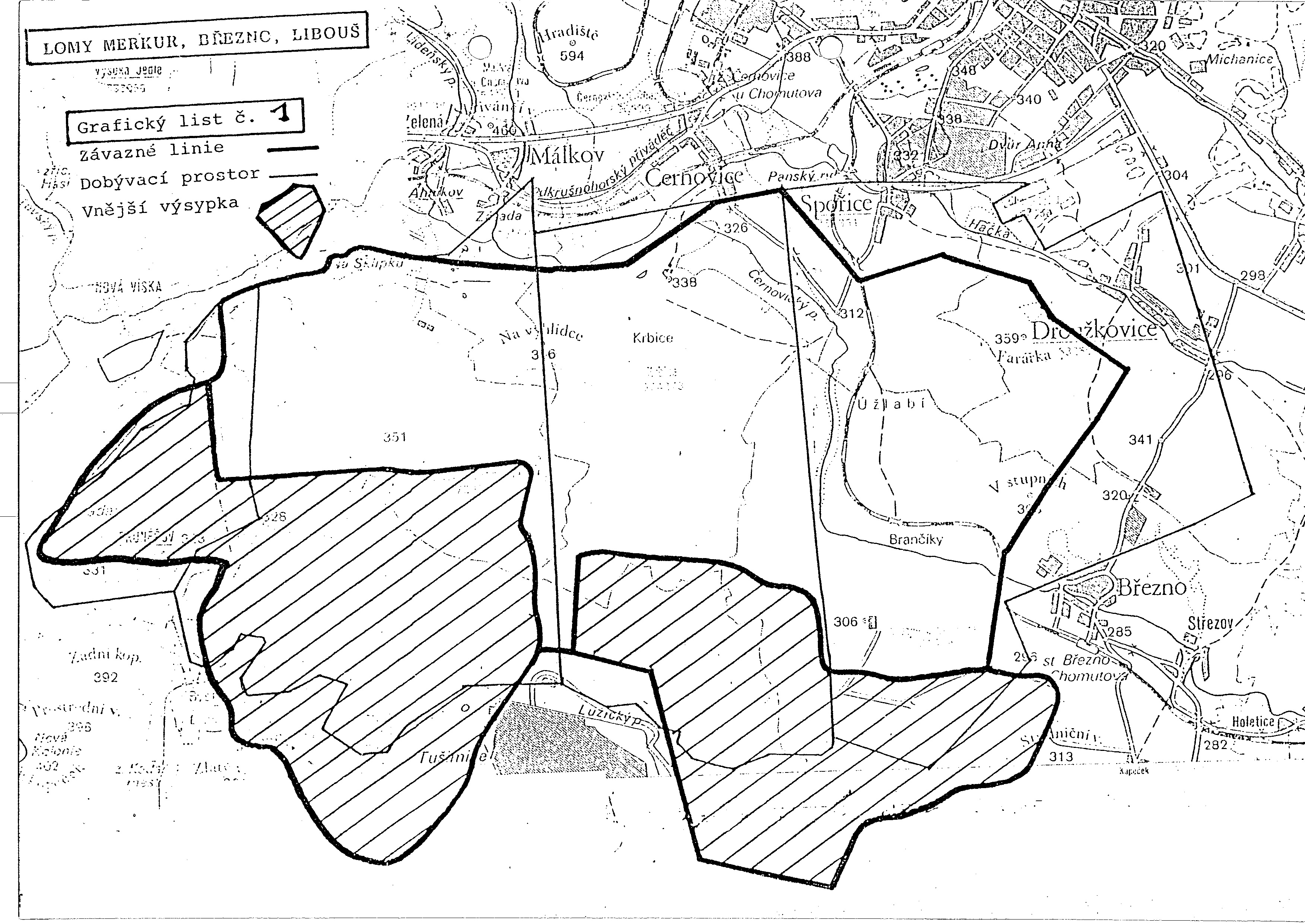 Hranice dobyvaciho prostoru severoceskych hnedouhelnych lomu Merkur, Brezno a Libous.